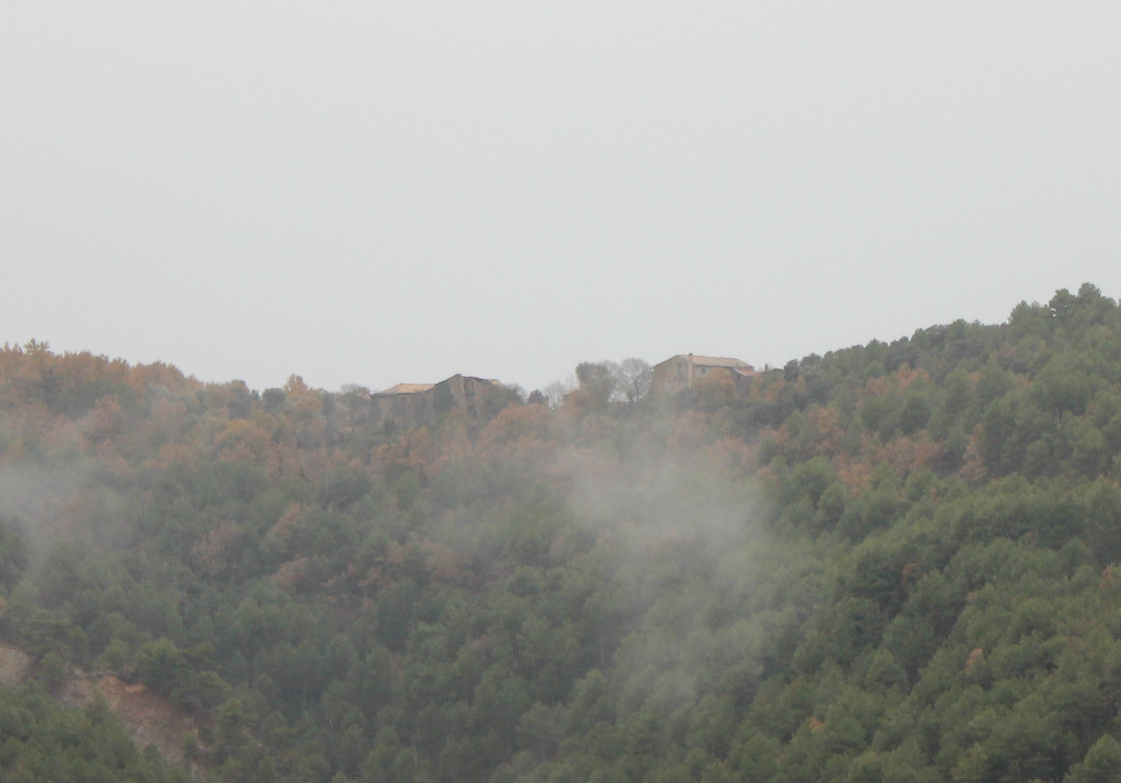 Aragonés: Envista de Caneto dende Trillo.